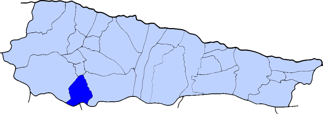 Localización de Meré en el municipio de Llanes